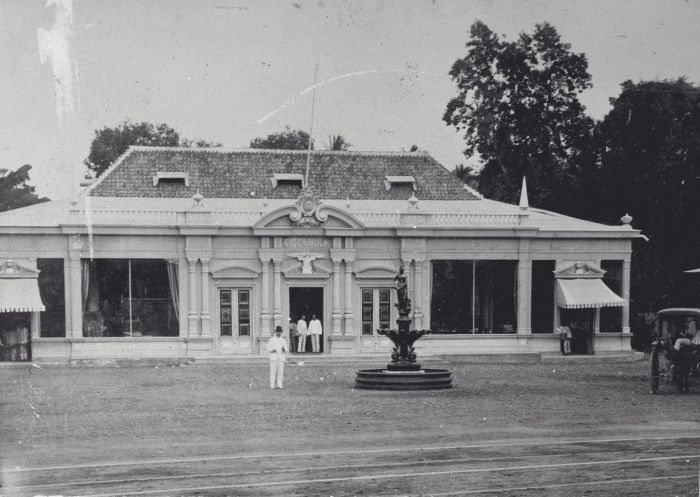 Foto. De winkel van "Eigen Hulp" aan de Molenvliet West, Batavia